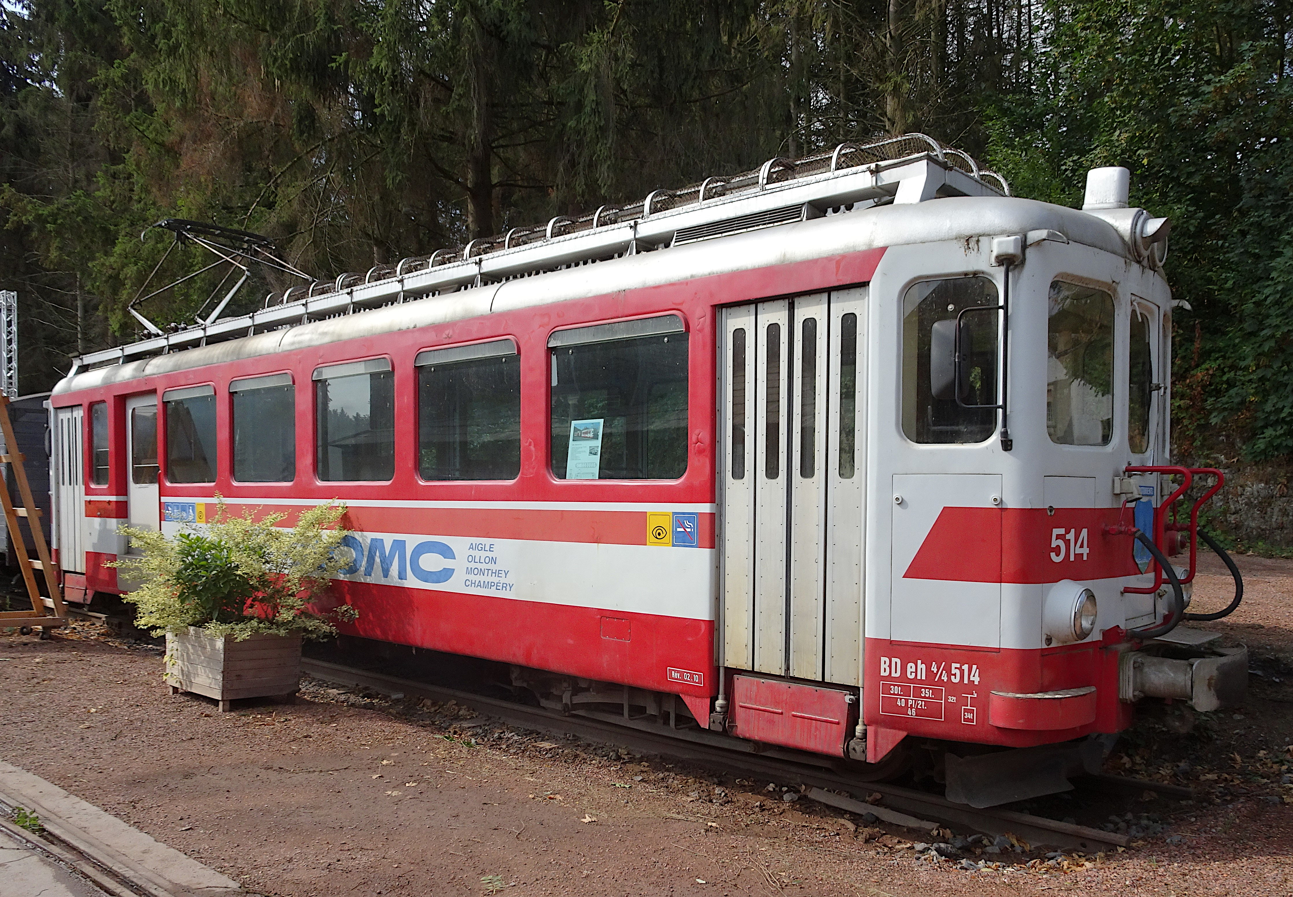 Atelier du train: tramway AOMC CFeh 4/4 11-14 à Pairi Daiza, dans le parc animalier à Cambron-Casteau, Belgique